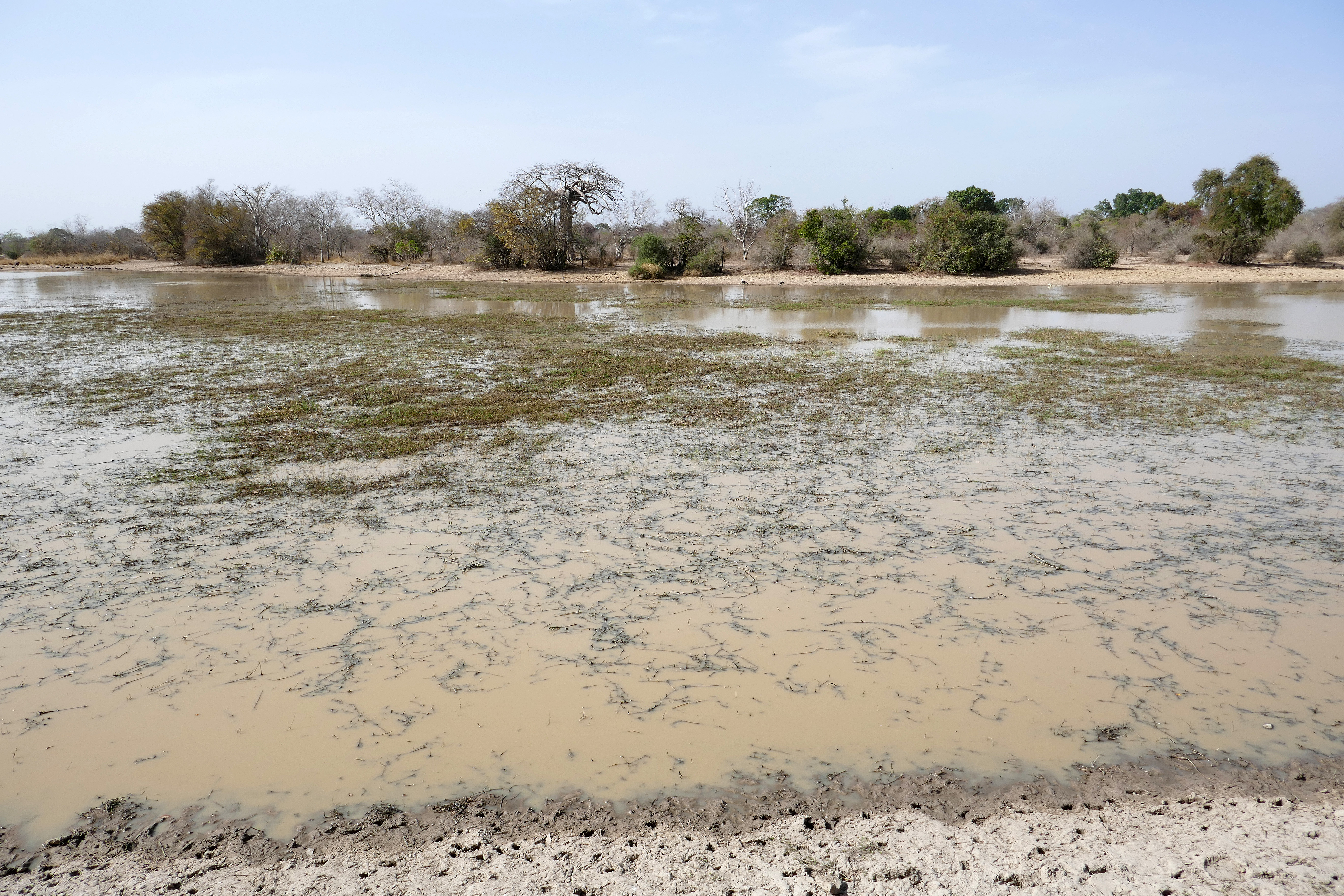 Parc national de la Pendjari (Bénin) : la mare Bali.